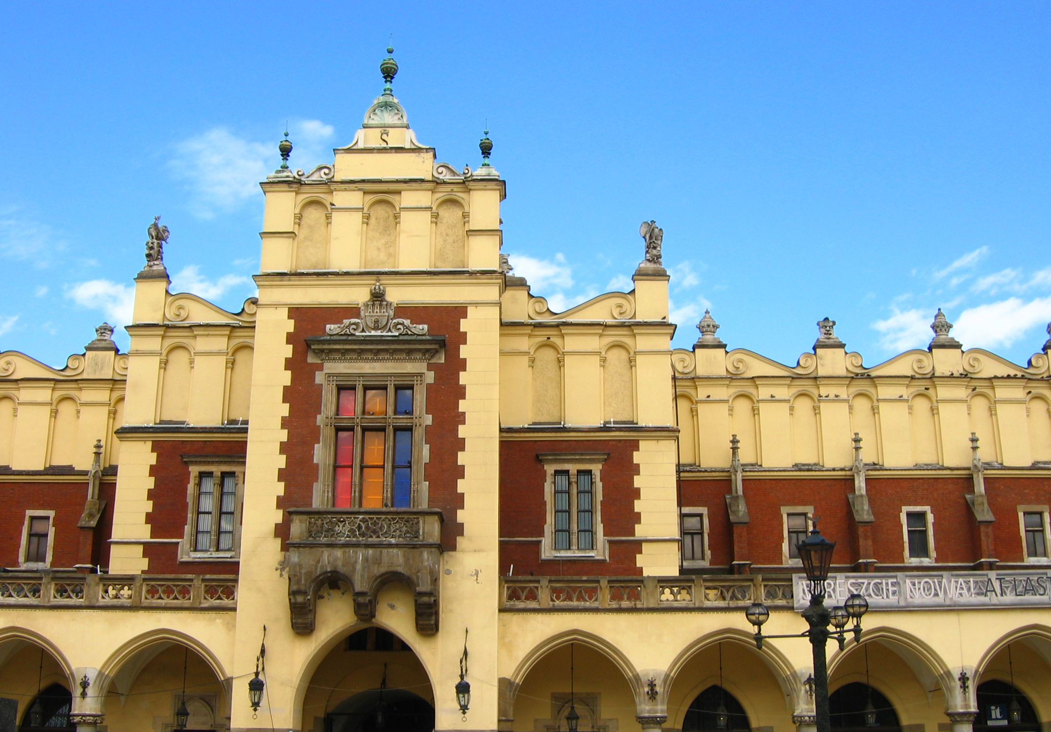 Sukiennice in Cracow